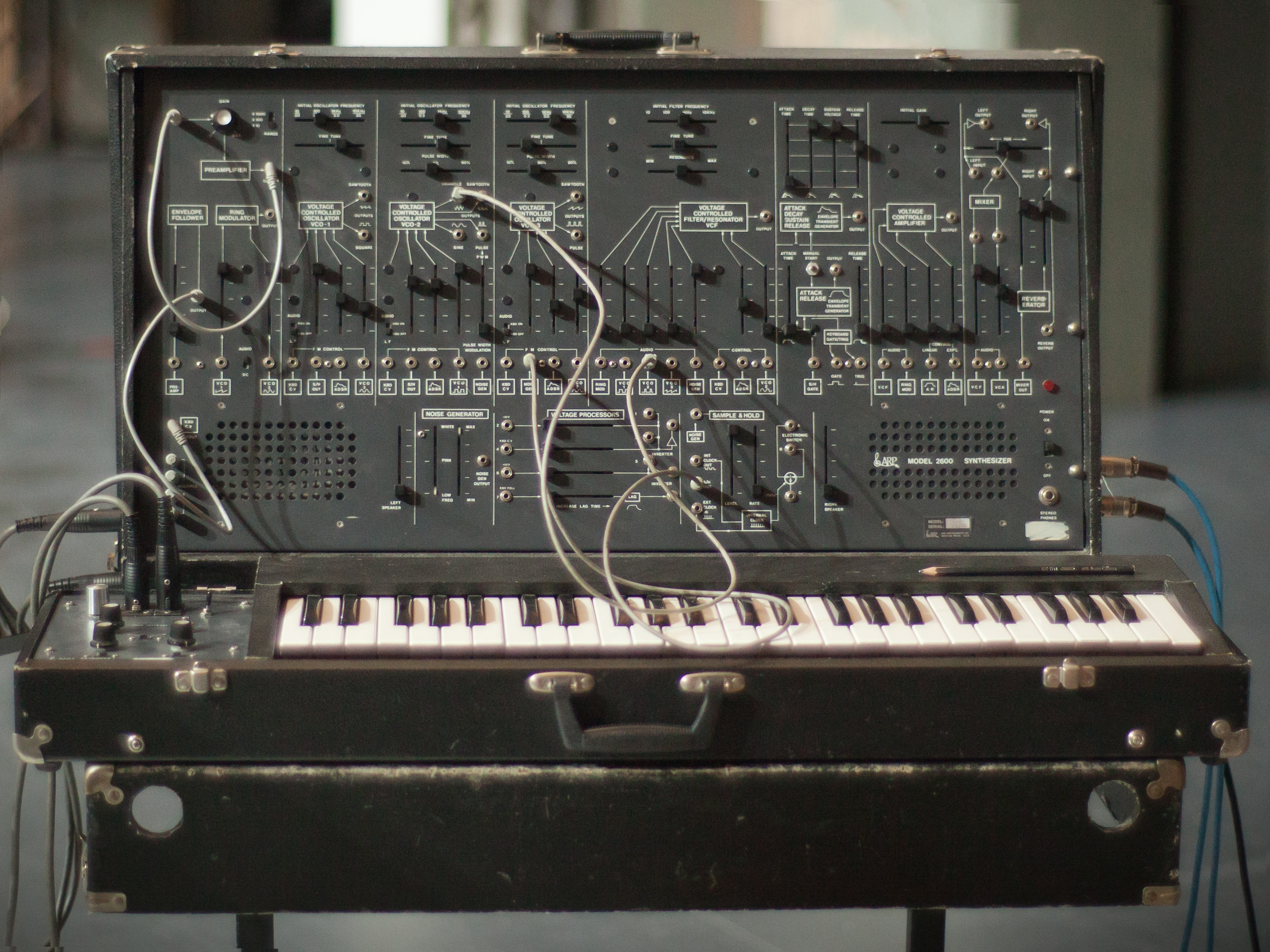 ARP 2600 by Esa Kotilainen Energo 2011 making of